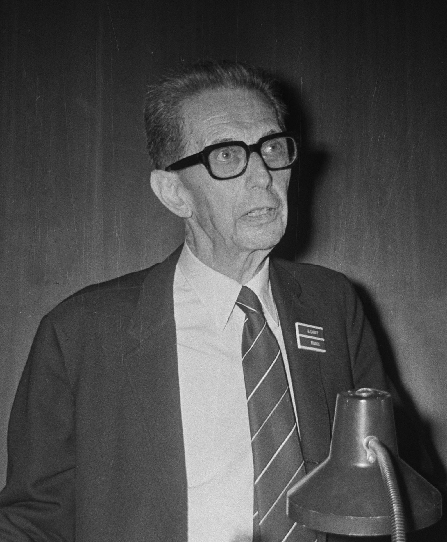 Internationaal congres over het ontstaan van kanker in de RAI te Amsterdam. Nobelprijswinnaar prof. dr. A. Lwoff